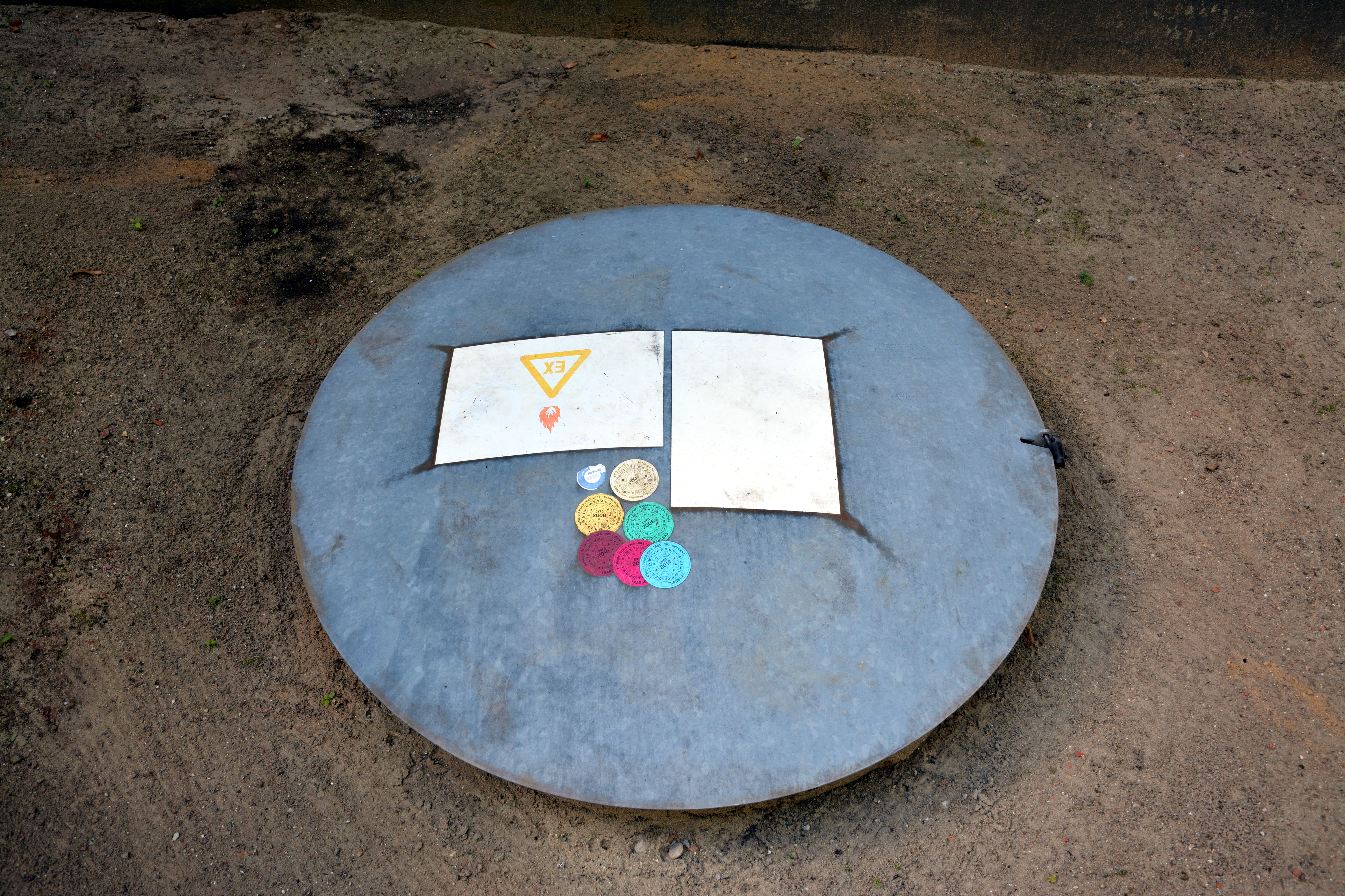 Ein Deckel mit vielen Aufklebern